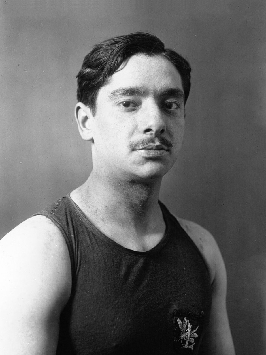 Rigal, nageur, en maillot : [photographie de presse] / Agence Meurisse